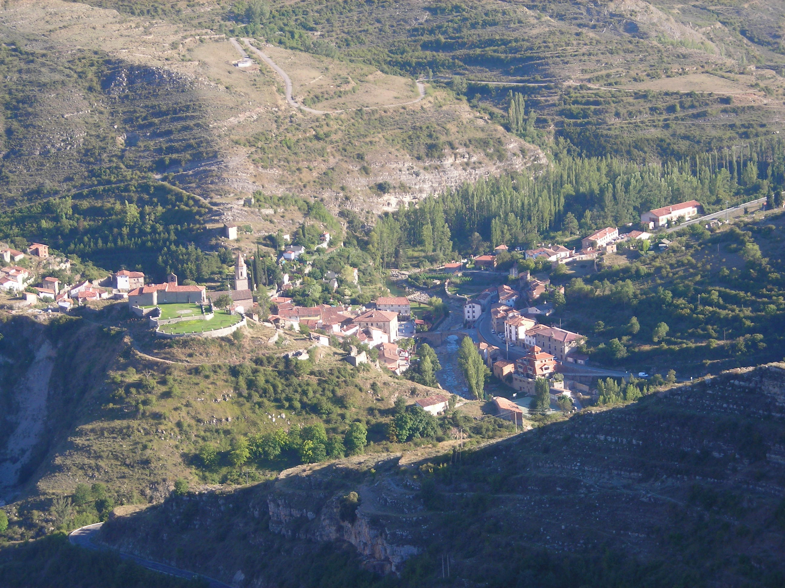 Vista de Soto en Cameros desde el Plano de Trevijano